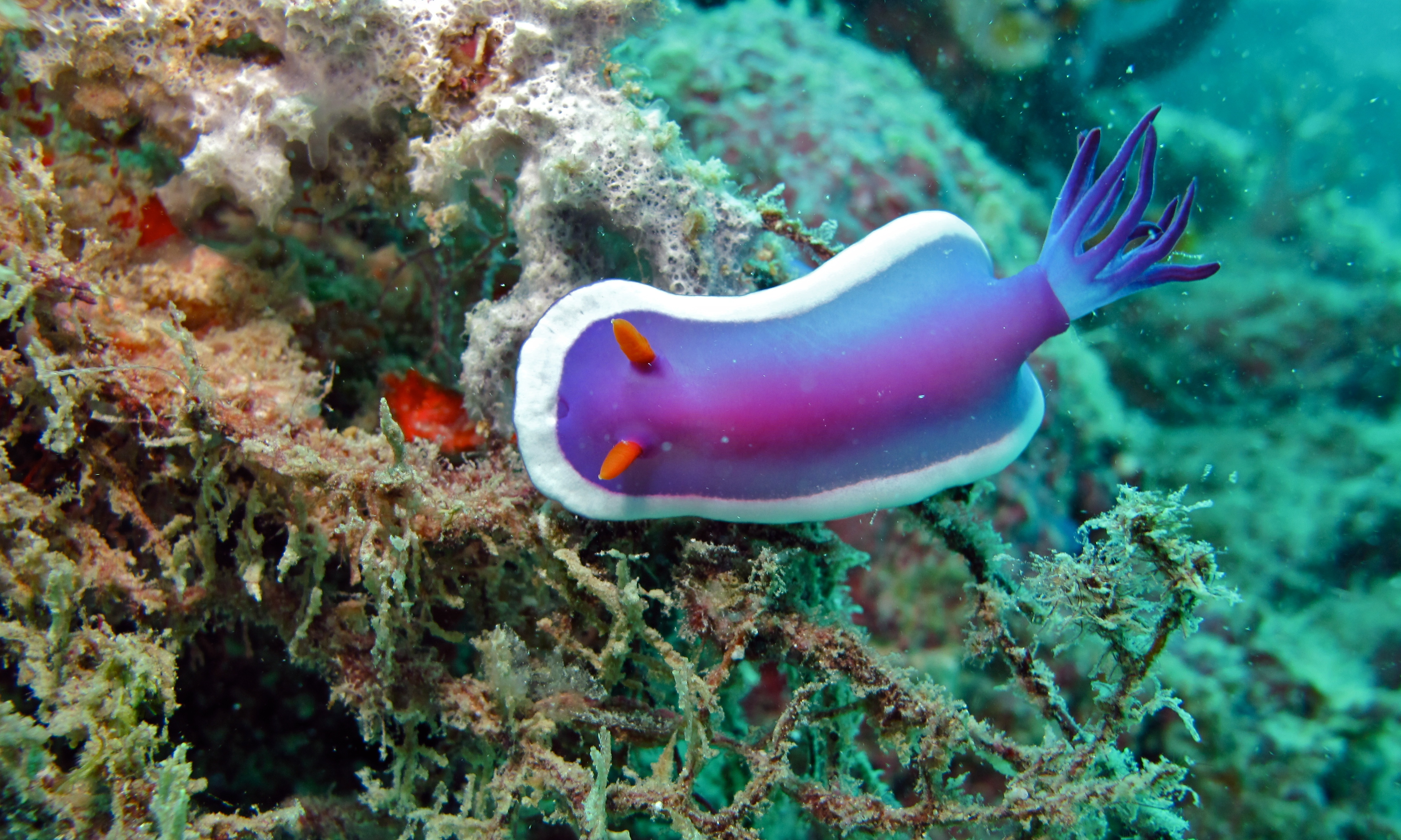 Paradise III, Pulau Mabul, Sabah, MALAYSIA